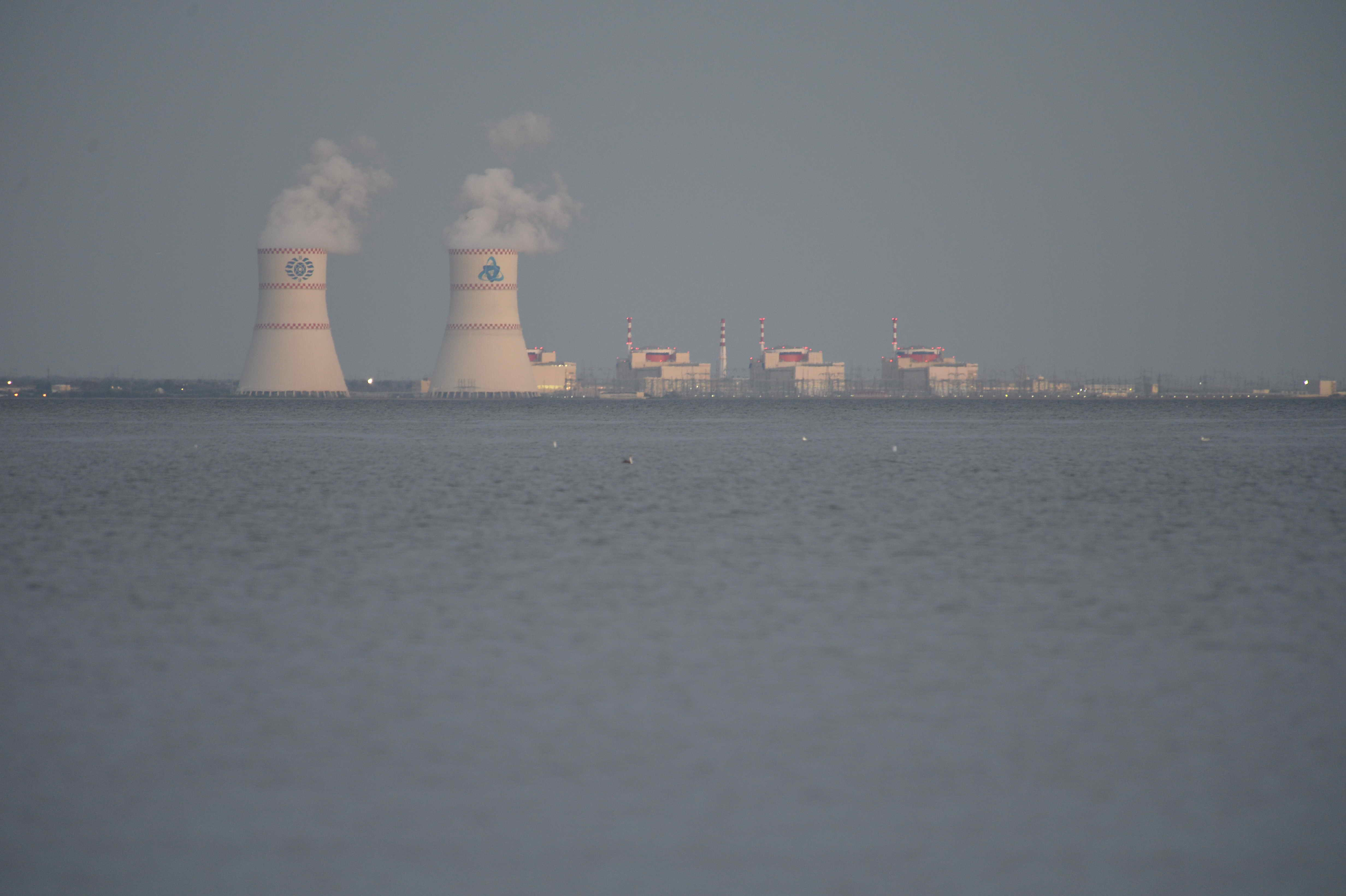 Вид Ростовской АЭС со стороны Цимлянского водохранилища